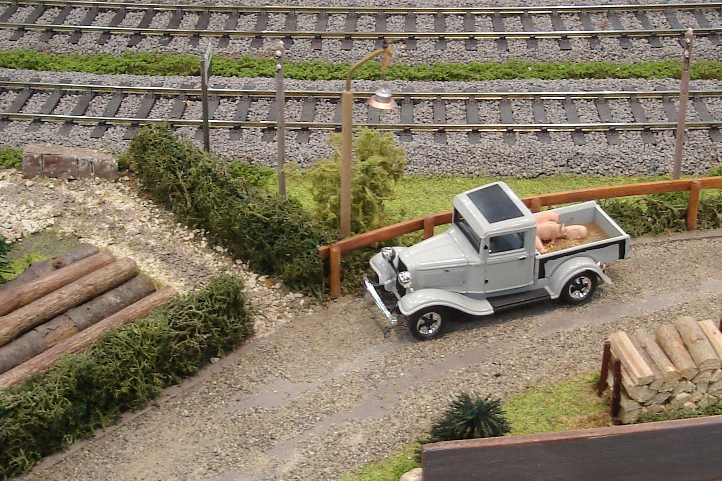 Ausschnitt eines Moduls der Modellbaugruppe Wangen bei Olten an der am 2. und 3. April 2011 stattgefundenen Spur-0-Expo in der Stadthalle Olten in der Schweiz. Das Bild zeigt ein Automodell im Massstab 1:43 im Bildzentrum des Moduls das in der Nenngrösse 0, das Heisst im Massstab 1:45 erbaut wurde. Die doppelspurigen Geleise im Hintergrund haben die Spur 0 mit einer Spurweite von 32 mm.